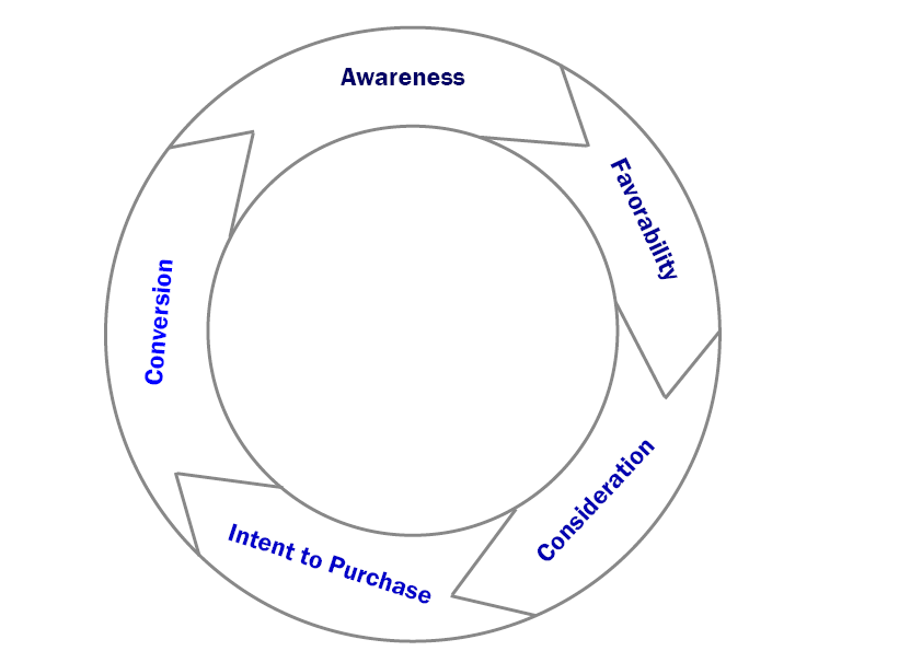 Die 5 Phase einer Customer Journey, als Kreis